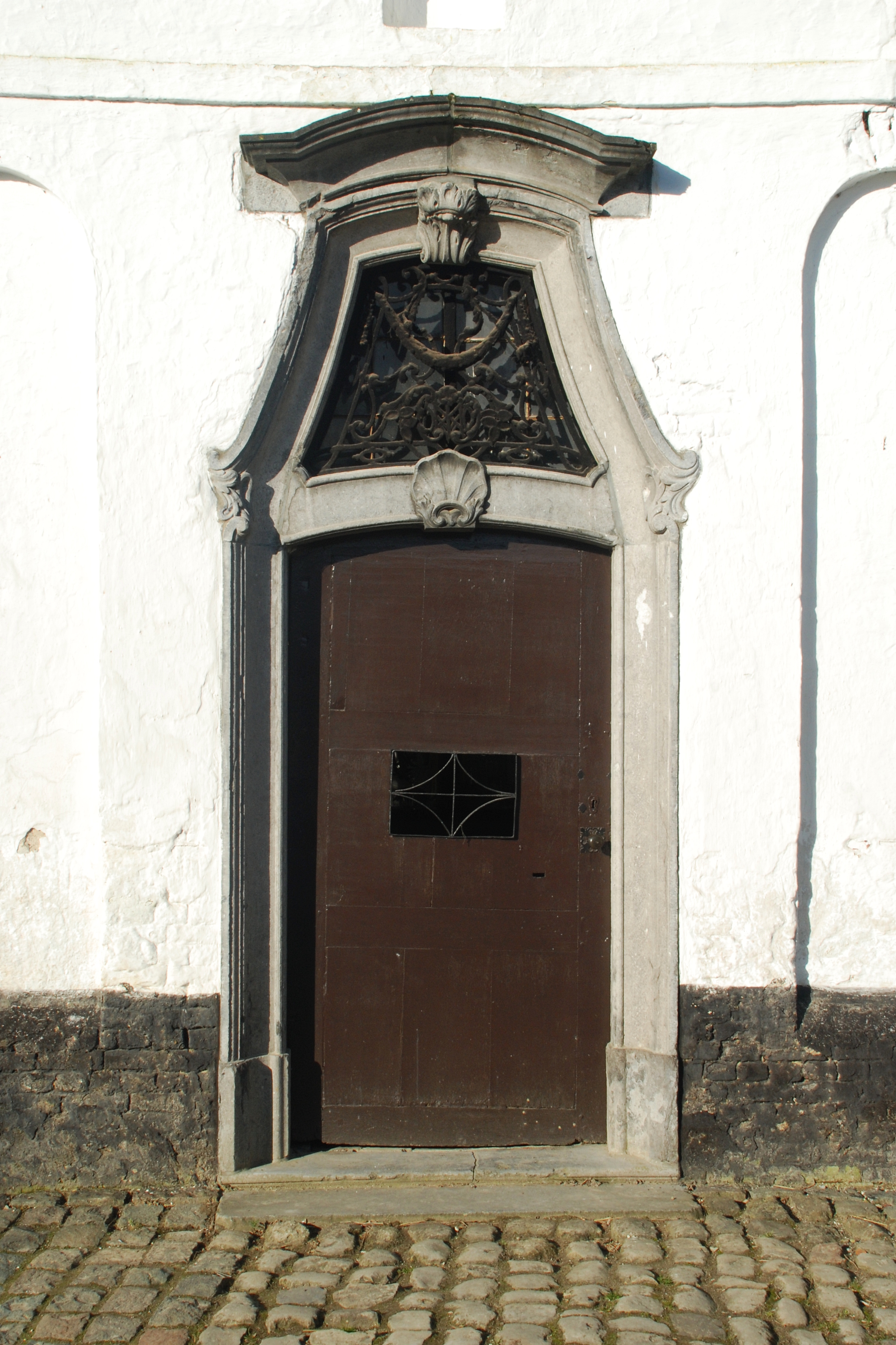 Belgique - Wallonie - Chapelle Notre-Dame des Affligés de Ways